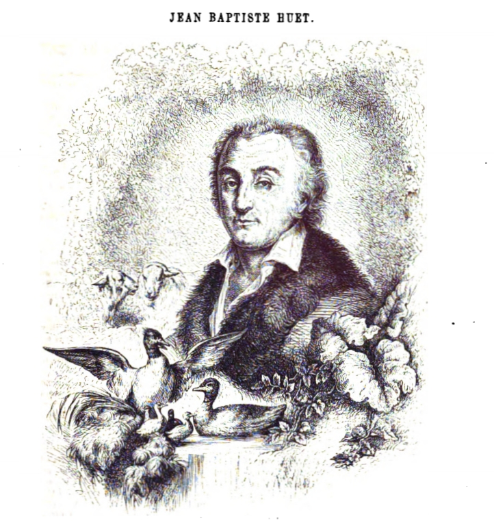 Jean-BaptisteHuët (1745-1811)